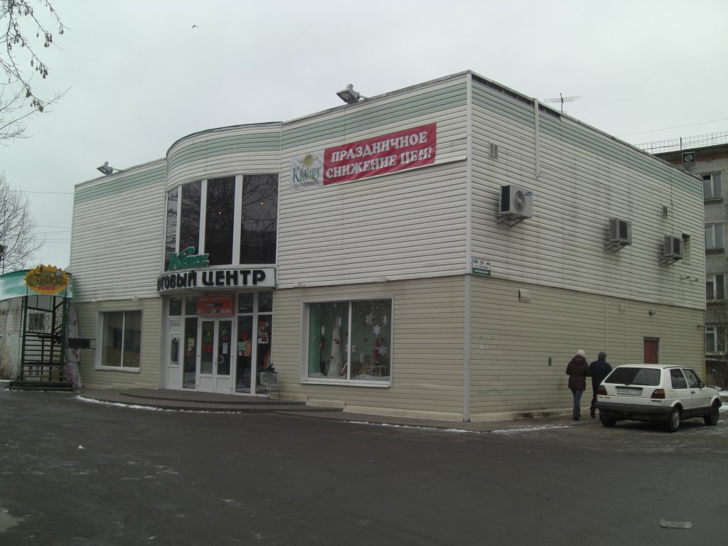 Торговый центр «Квартет» на улице Хохлова в Гатчине